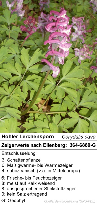 Beispielhafte Aufschlüsselung der Zeigerwerte nach Ellenberg für den Hohlen Lerchensporn